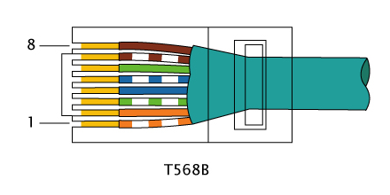 Schema connettore RJ-45 - Cablaggio EIA/TIA-568B - Orientamento sx - Elaborazione personale